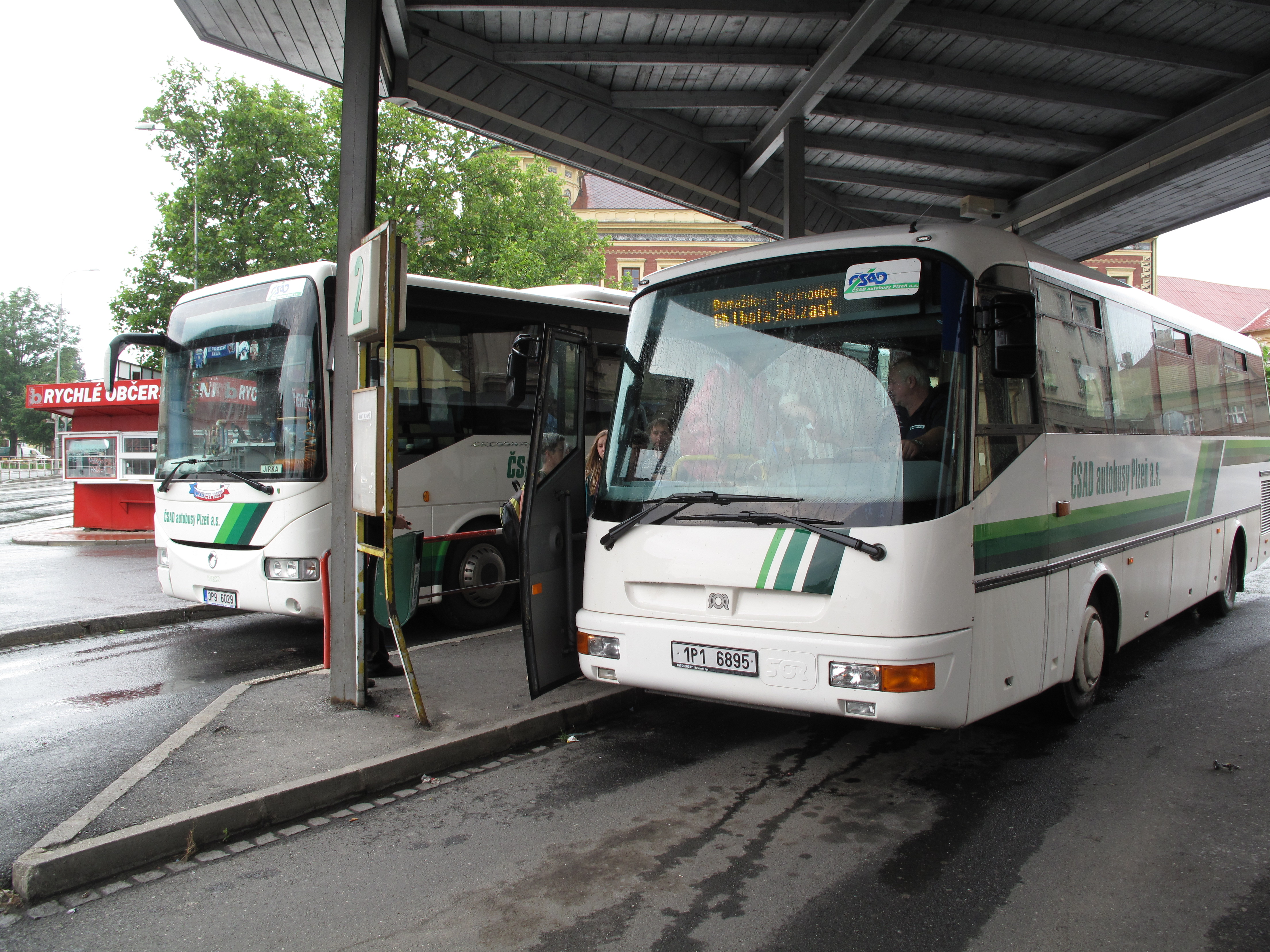 Domažlice, autobusové nádraží